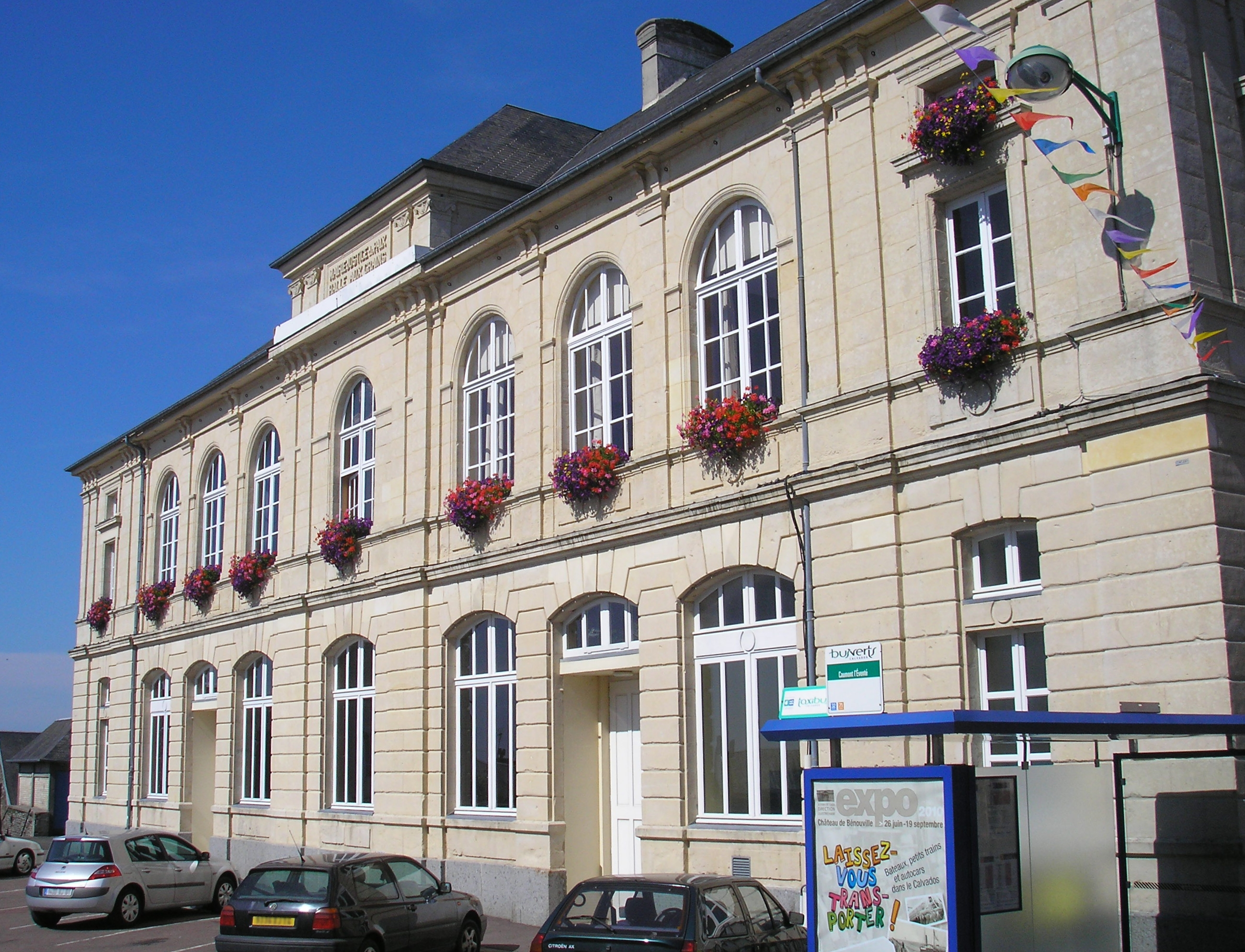 Caumont-l'Éventé (Normandie, France). L'hôtel de ville.